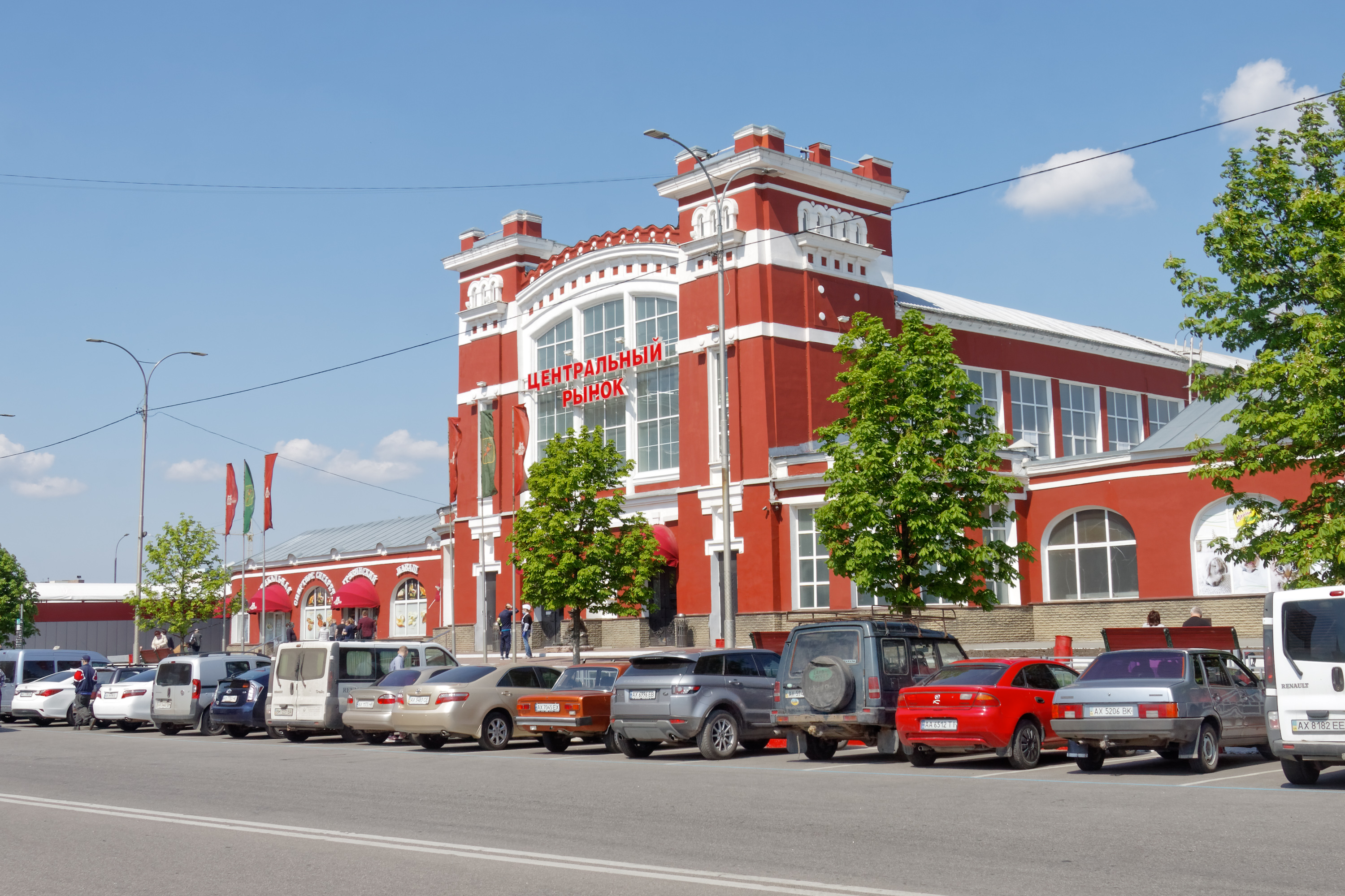 Центральний ринок у Харкові (має також назву Благовещенський)